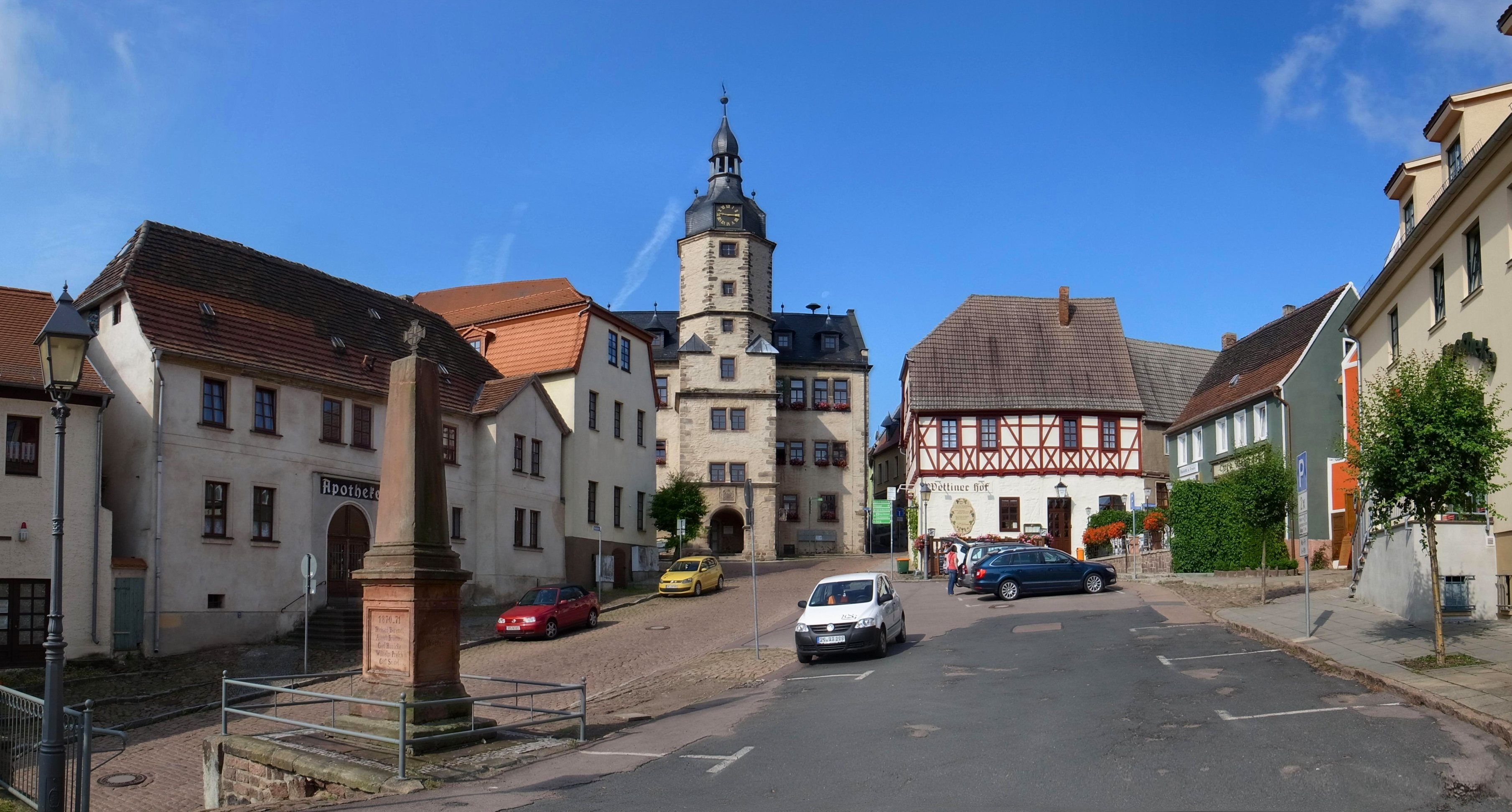 Wettin, Rathaus am Markt, Denkmal 1870-71